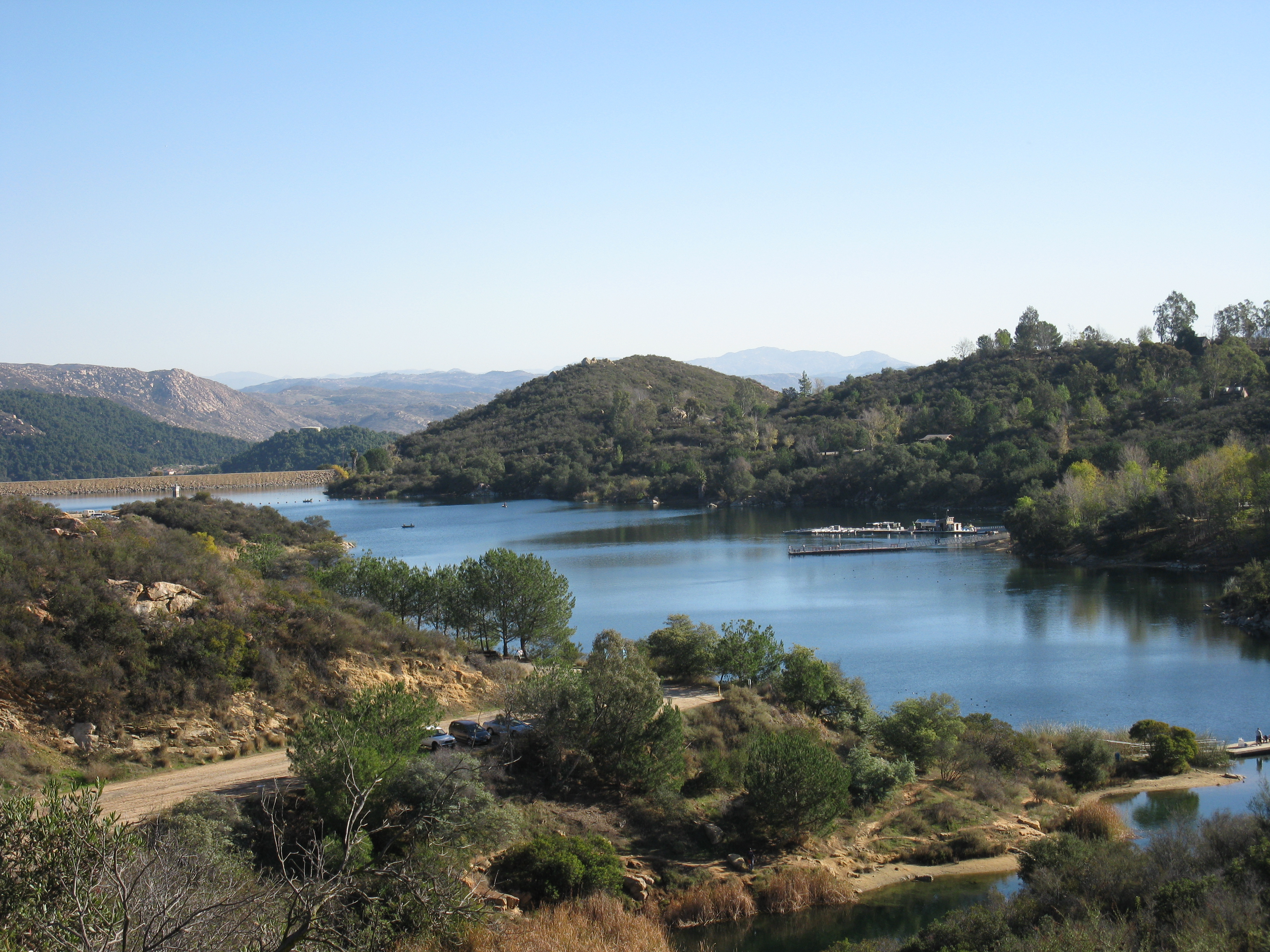 Lake Dixon, Escondido. Photo taken December 23, 2009.